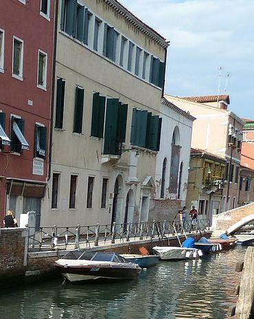 rio s ana - ancien hopital ss pierre et paul